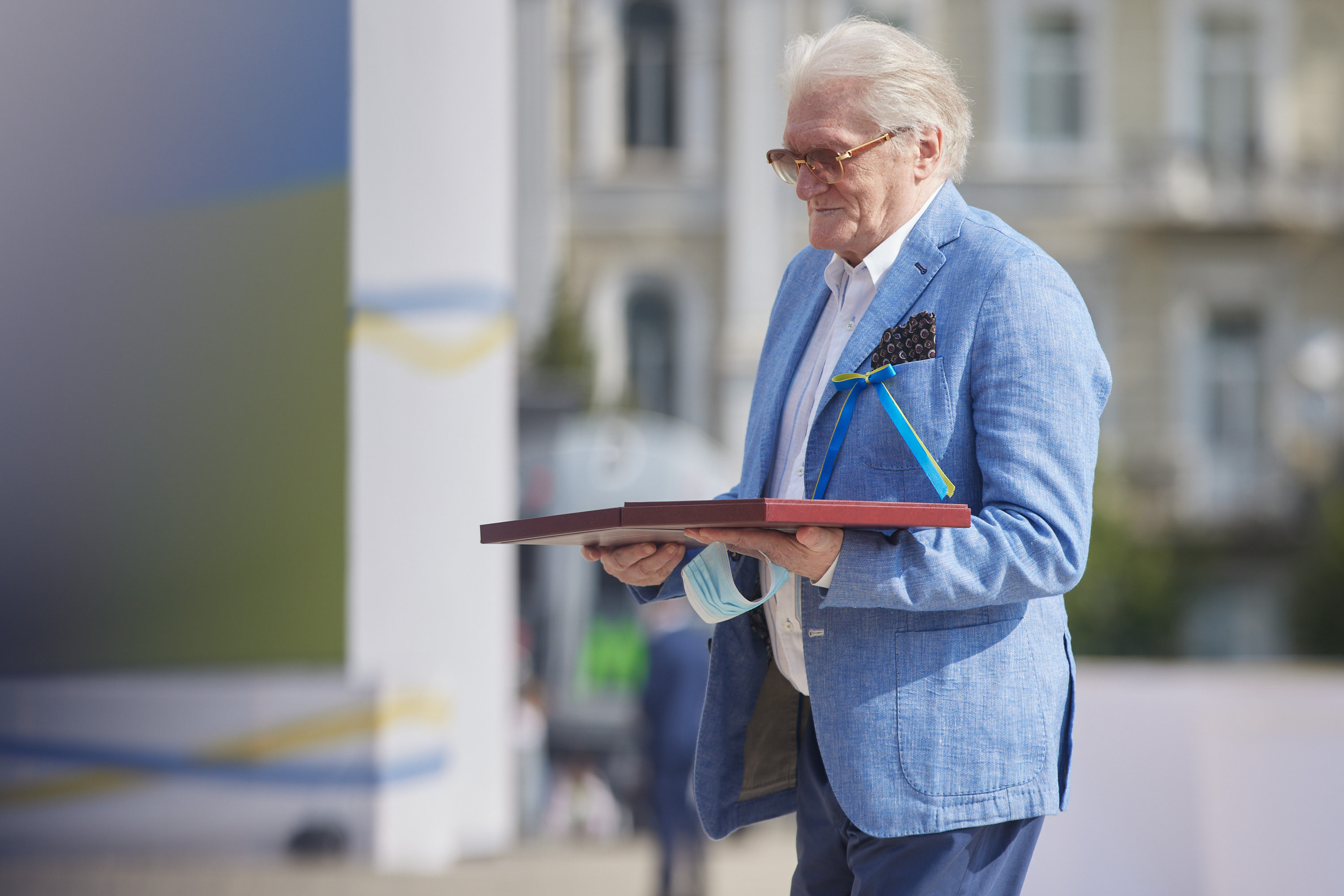 Герой України Юрій Рибчинський з Орденом Держави